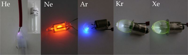 noble gas color Bildbeschreibung: Edelgase im eigenen Licht Quelle: Foto aus meiner Elementesammlung, Material von Heinrich Pniok Fotograf/Zeichner: Tomihahndorf Datum: April 2006